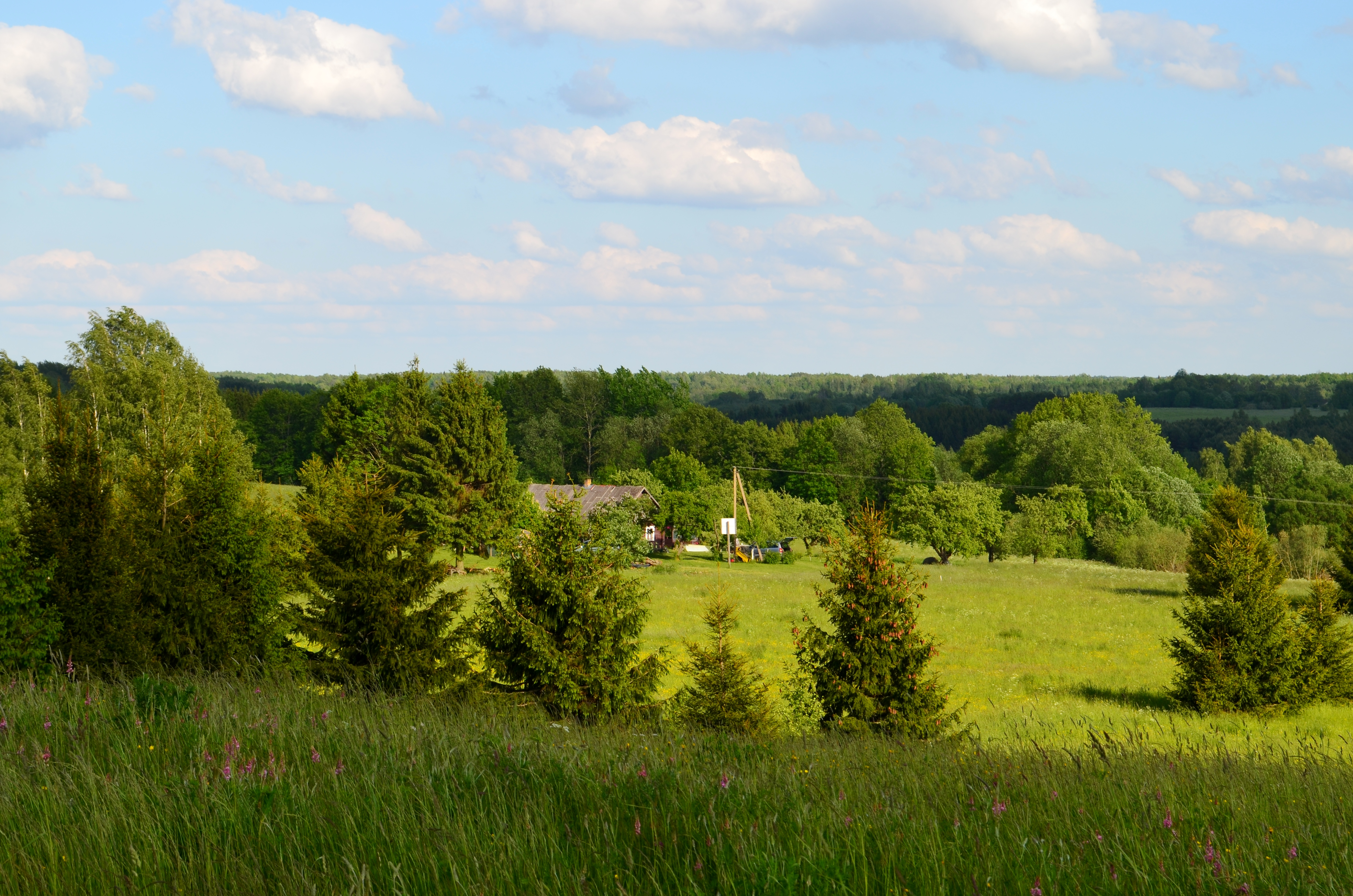 Varguliai, Anykščių raj.